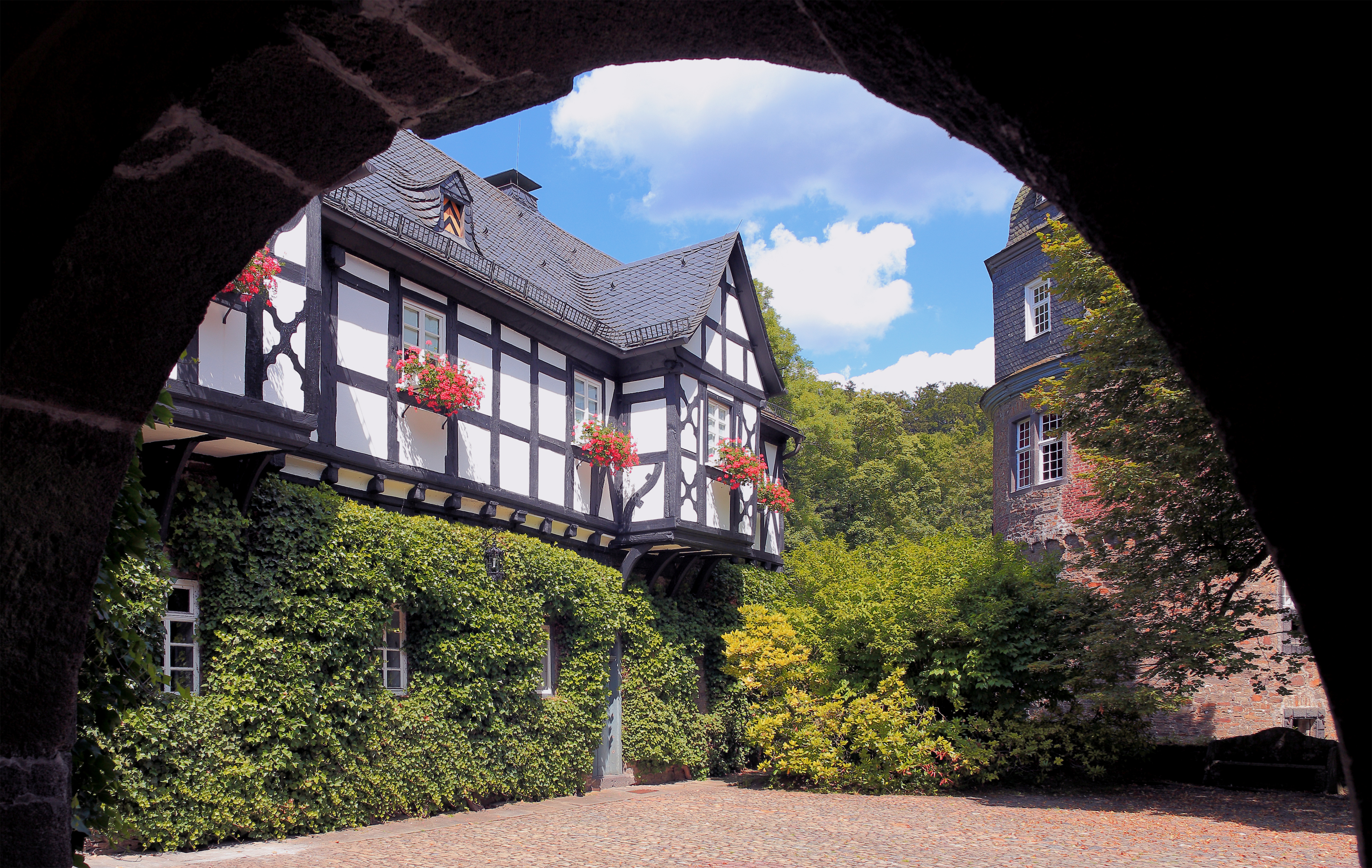 Schloss Crottorf – Das romantische Wasserschloß aus dem 16. Jh. geht mit seinen Anfängen bis in 12. Jh. zurück. Es gehört heute dem Grafen von Hatzfeld-Wildenburg.